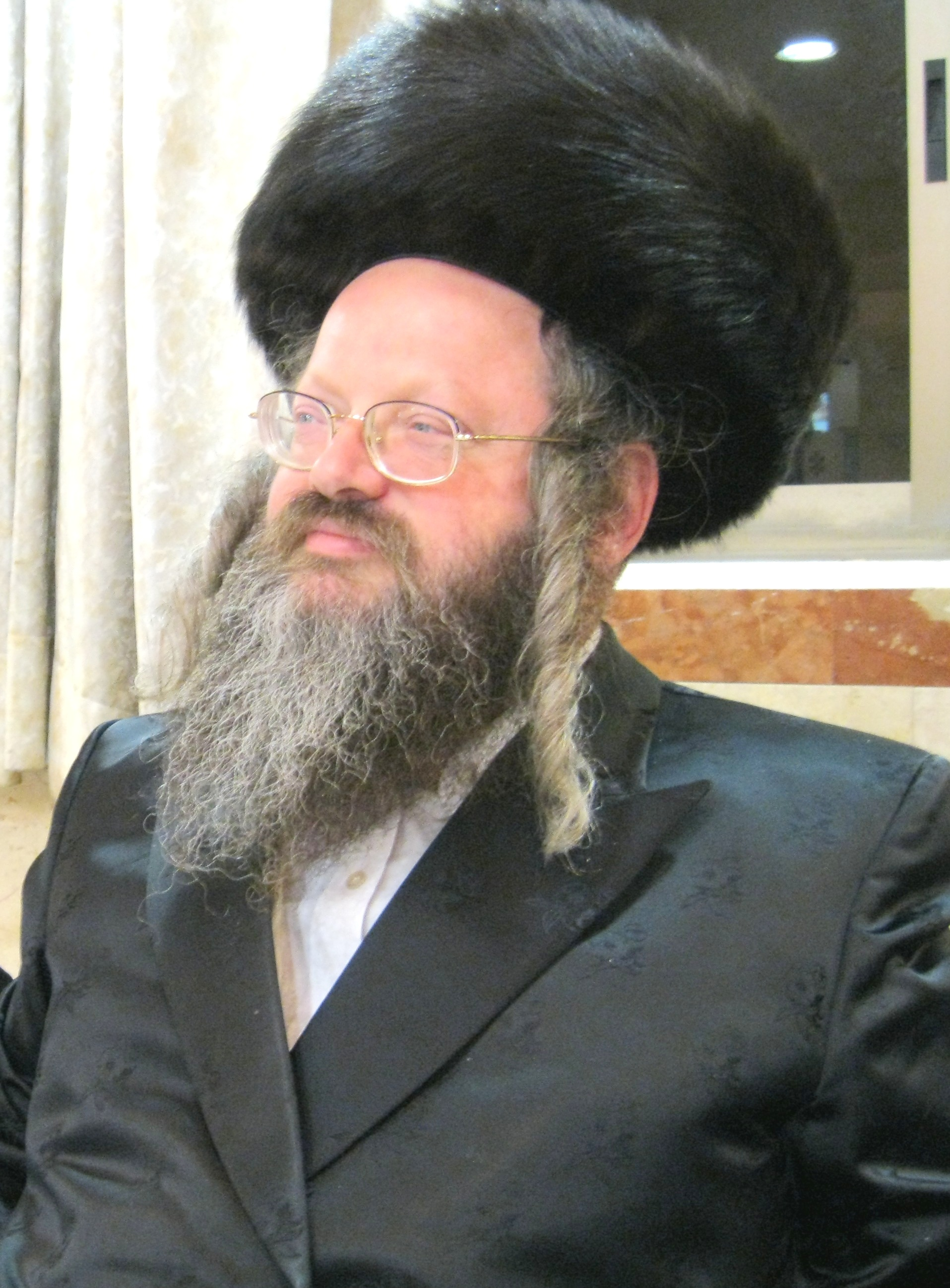 הגרמ"ש קליין נודע כאחד מגדולי הפוסקים, ותלמידו הקרוב של זקן הפוסקים הגר"ש וואזנר שליט"א, שסמך ידיו עליו לפסוק ולהנחיל את משנתו ודרכי הוראתו לרבנים ומורי הוראה ולכלל הציבור.